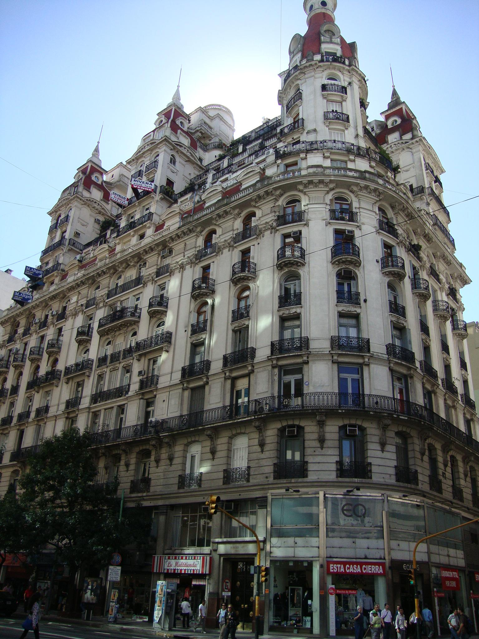 Vista desde la calle Esmeralda hacia el noroeste del edificio de departamentos proyectado por Eduardo Le Monnier para la constructora Bencich Hermanos en 1927. Está en la esquina de la Avenida Córdoba y la calle Esmeralda. En uno de sus departamentos vivió la poetisa Alfonsina Storni. Buenos Aires, Argentina.